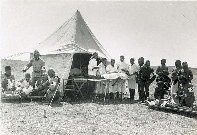 1917 yılında Filistin cephesindeki sıhhiyeci Osmanlı askerleri